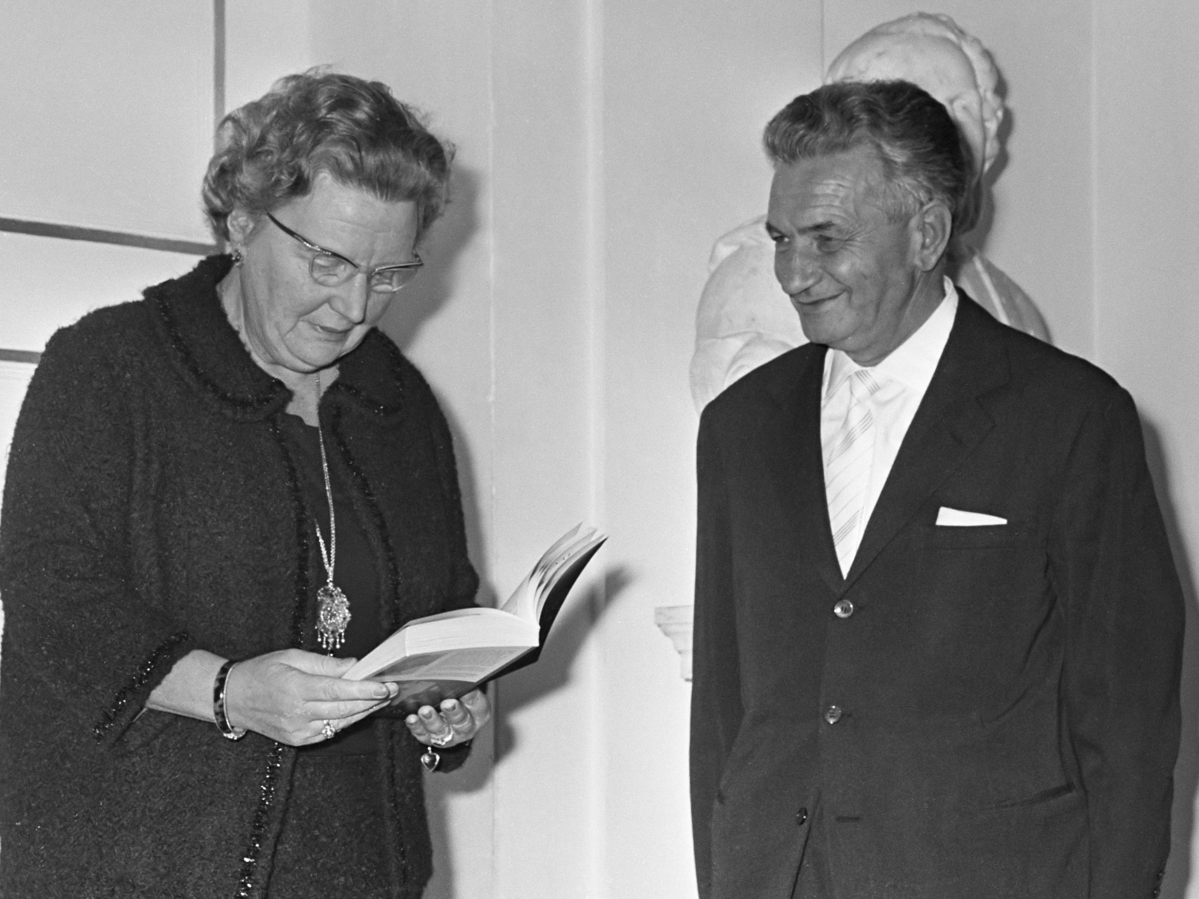 Koningin Juliana ontvangt ds. Tullio Viney op Paleis Soestdijk. Hare Majesteit te midden van ds. Viney en zijn echtgenote 2 november 1967